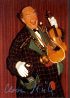 Einladungsfoto zum siebzigsten Geburtstag von Georg Spillner